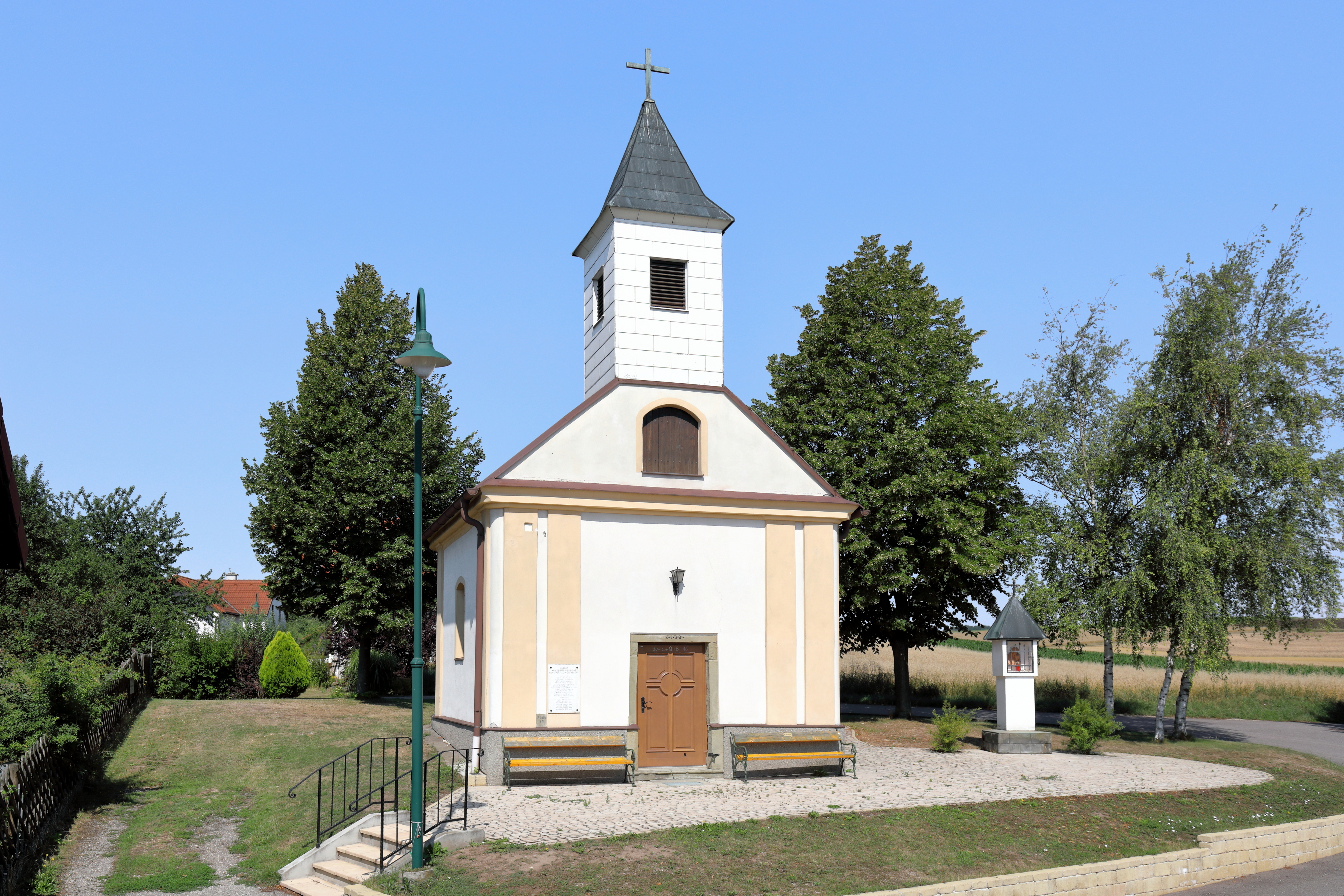 Die röm.-kath. Ortskapelle hl. Antonius in Kleinebersdorf, ein Ortsteil der niederösterreichischen Marktgemeinde Großrußbach. Der schlichte Sakralbau mit Faschengliederung und Giebelreiter ist mit 1738 datiert und wurde in erhöhter Lage im Nordwesten des Ortes errichtet.